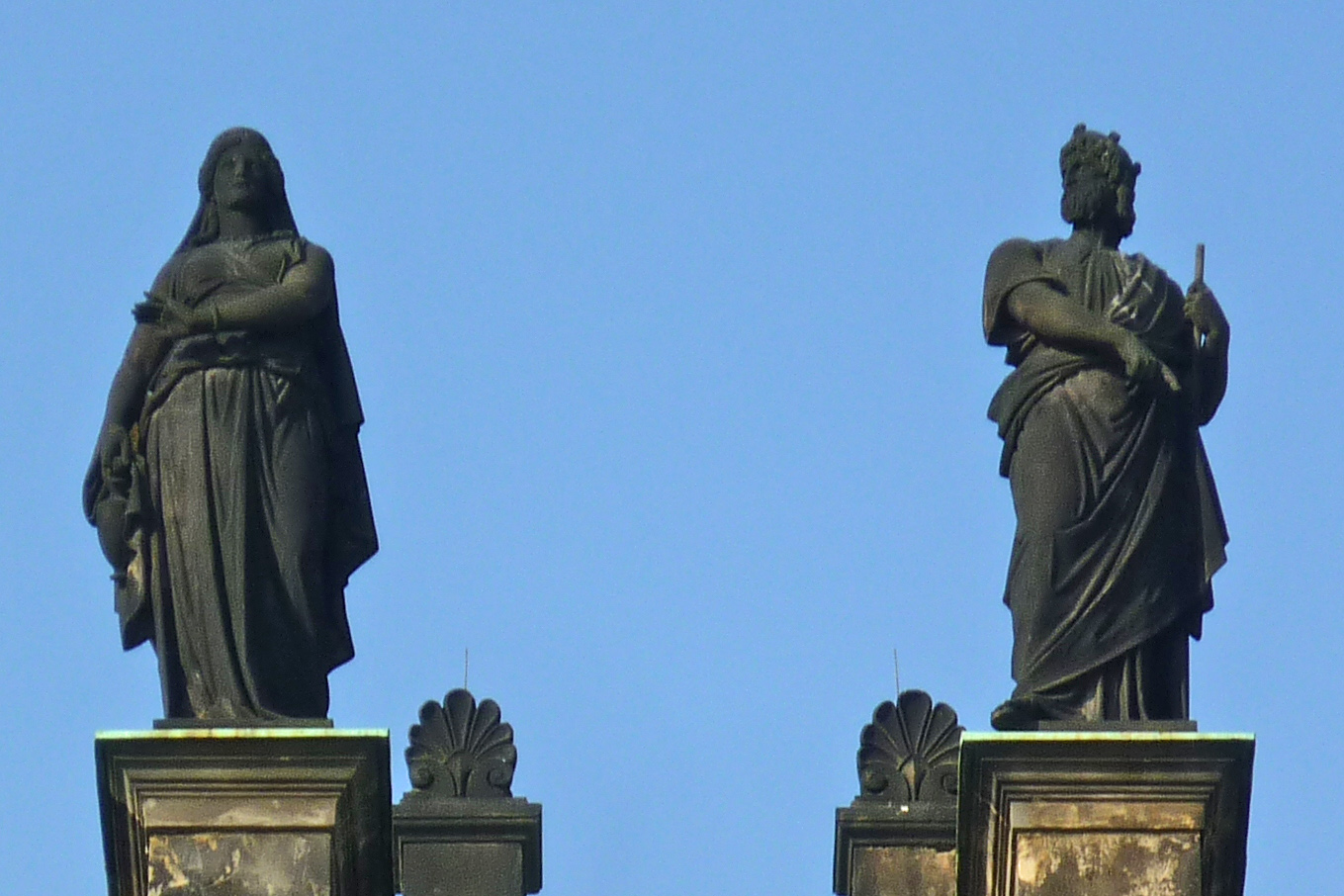 Skulpturen Antigone und Kreon an der Semperoper in Dresden